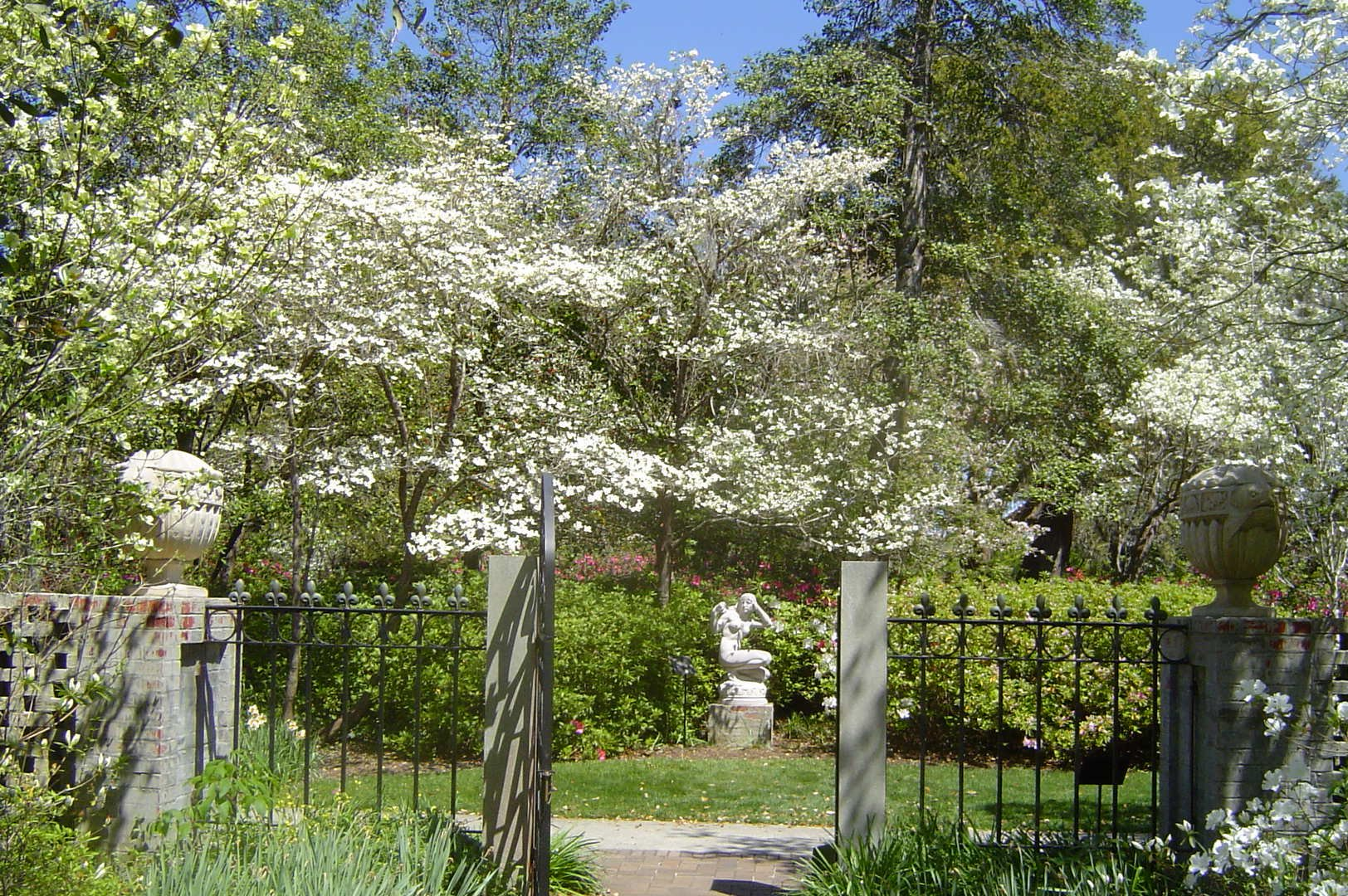 Brookgreen Gardens